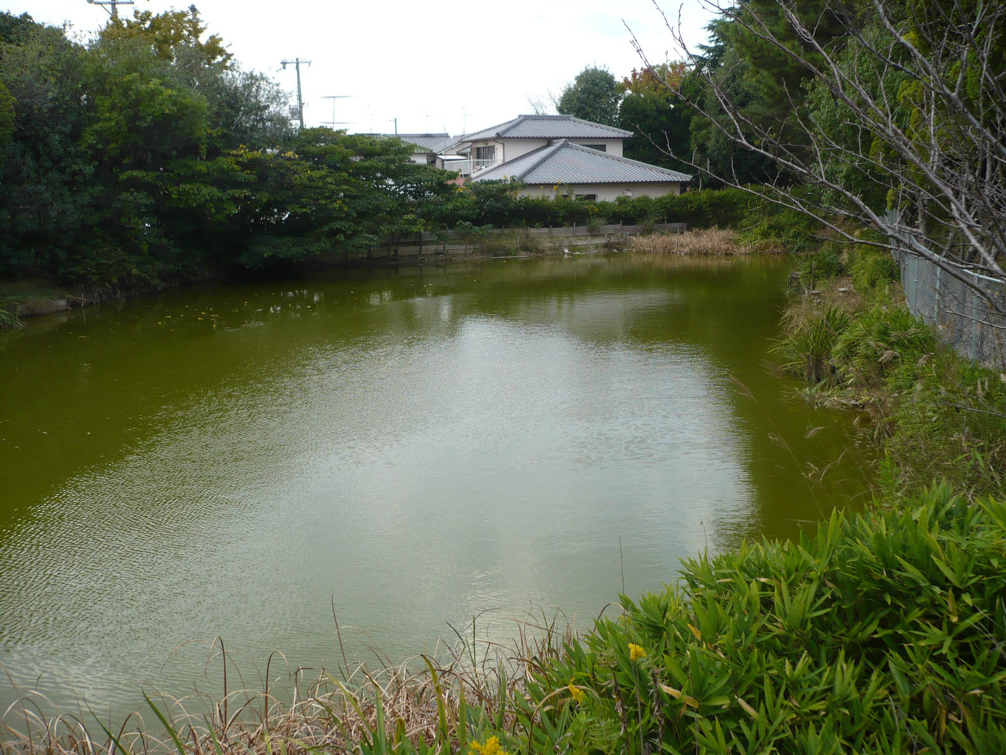 貝吹山古墳の堀